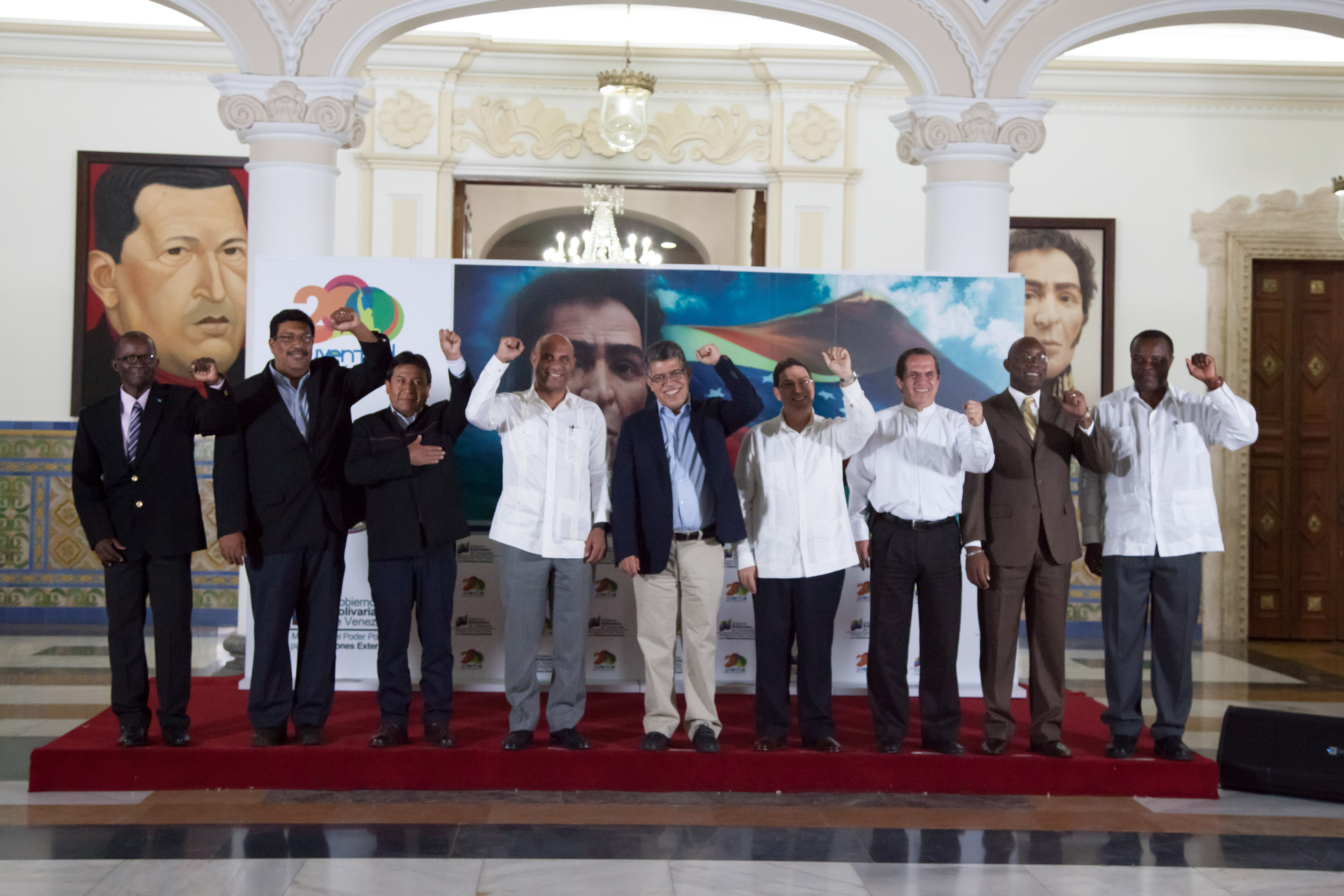 Caracas (Venezuela). Foto oficial de los Cancilleres de la XIII Reunión del Consejo Político del ALBA.